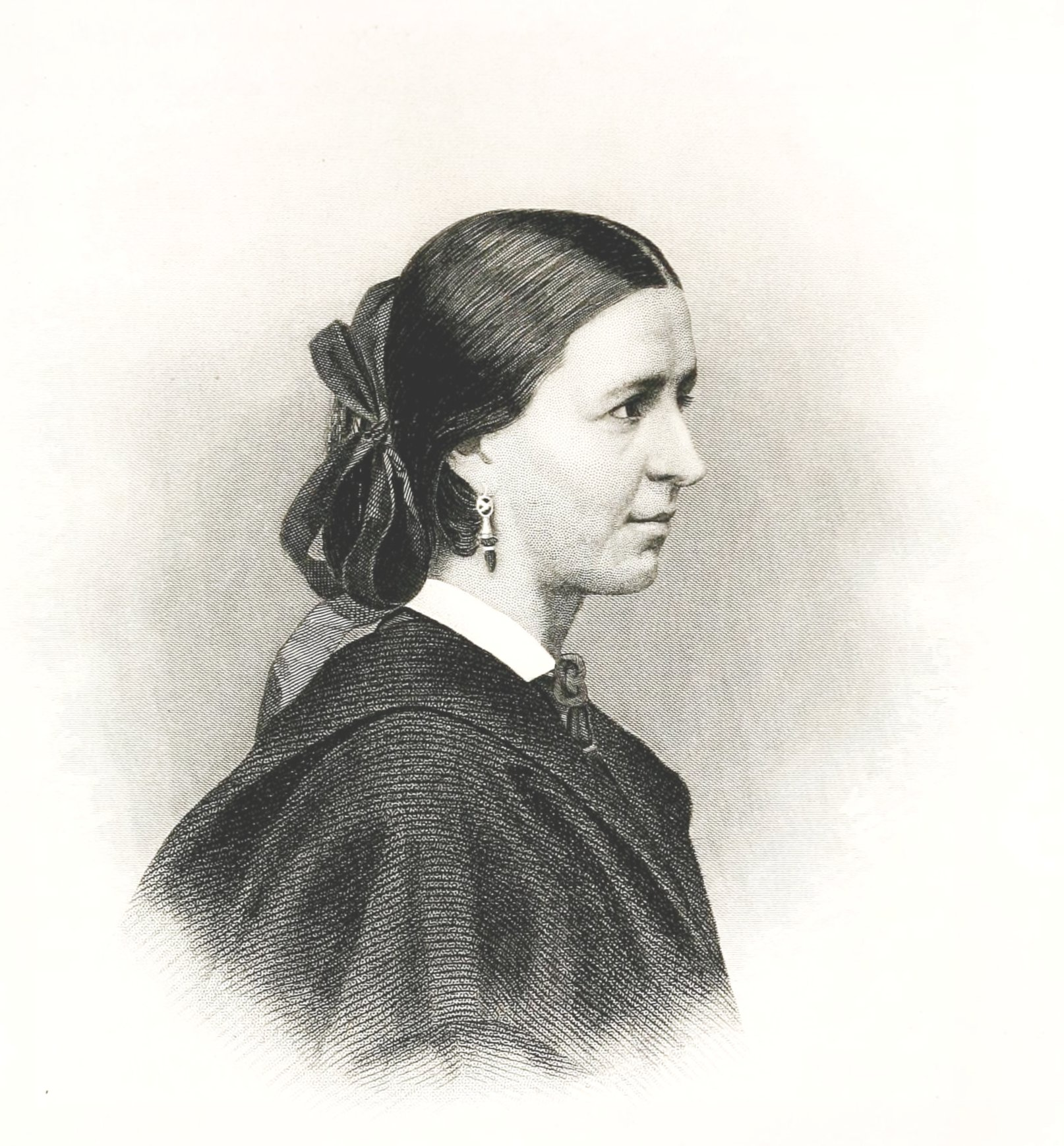 Belle Reynolds (1840-1937)